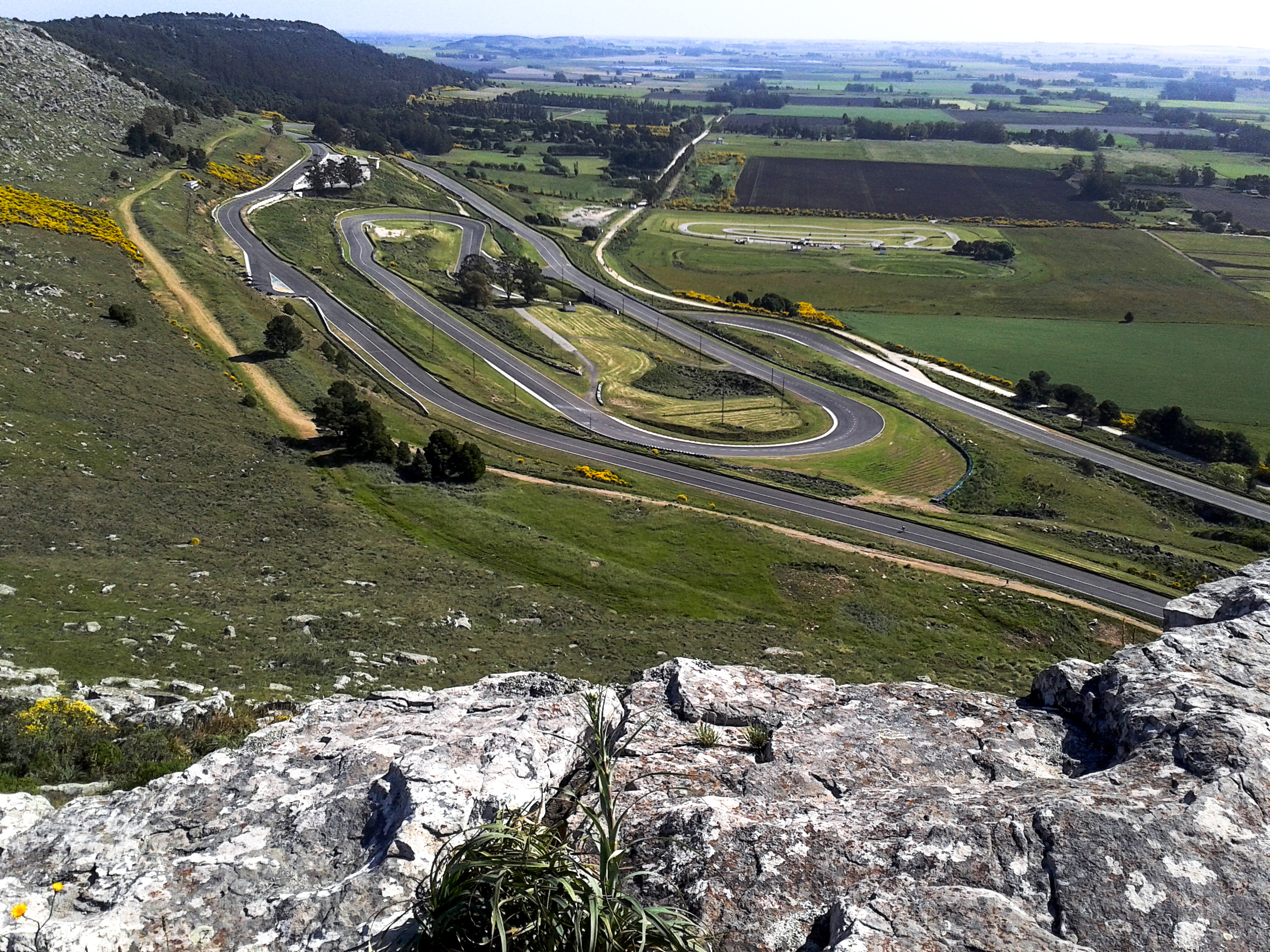 Balcarce -. Autódromo Juan Manuel Fangio visto desde la Sierra La Barrosa